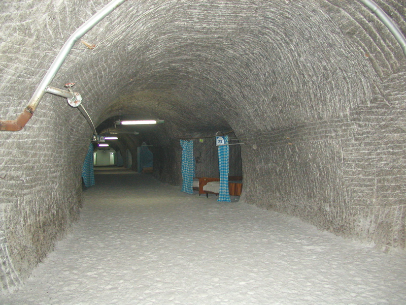 Asztma- és allergológiai szanatórium az aknaszlatinai 9-es sóbányában